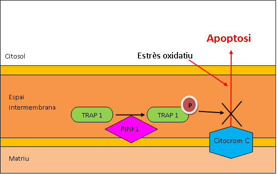 Fosforilació de TRAP